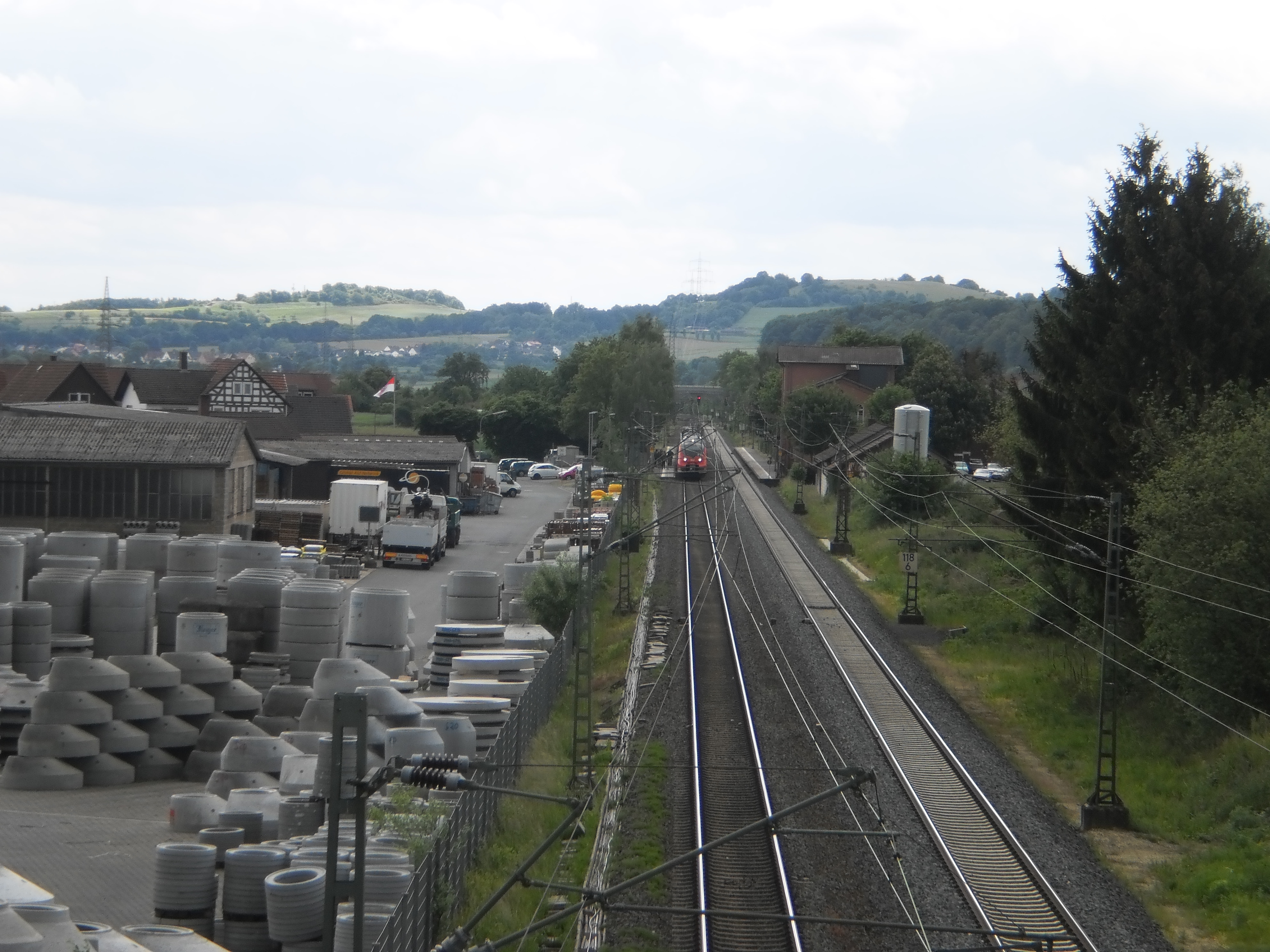 Blick von der Strassenbrücke der Ortsumfahrung von Fronhausen über die Main-Weser-Bahn auf den Bahnhof Fronhausen an der Lahn. Dort am Bahnsteig haltender Zug in Richtung Marburg und in den Landkreis Marburg-Biedenkopf nach Norden durch das Lahntal zwischen Gießen und Marburg. Links der Oberleitungen das Betonwerk Finger mit Röhren für Zisternen. In der Ferne ist von hier lahnabwärts der Altenberg oberhalb von Odenhausen zu sehen (bereits im Nachbarlandkreis Giessen).